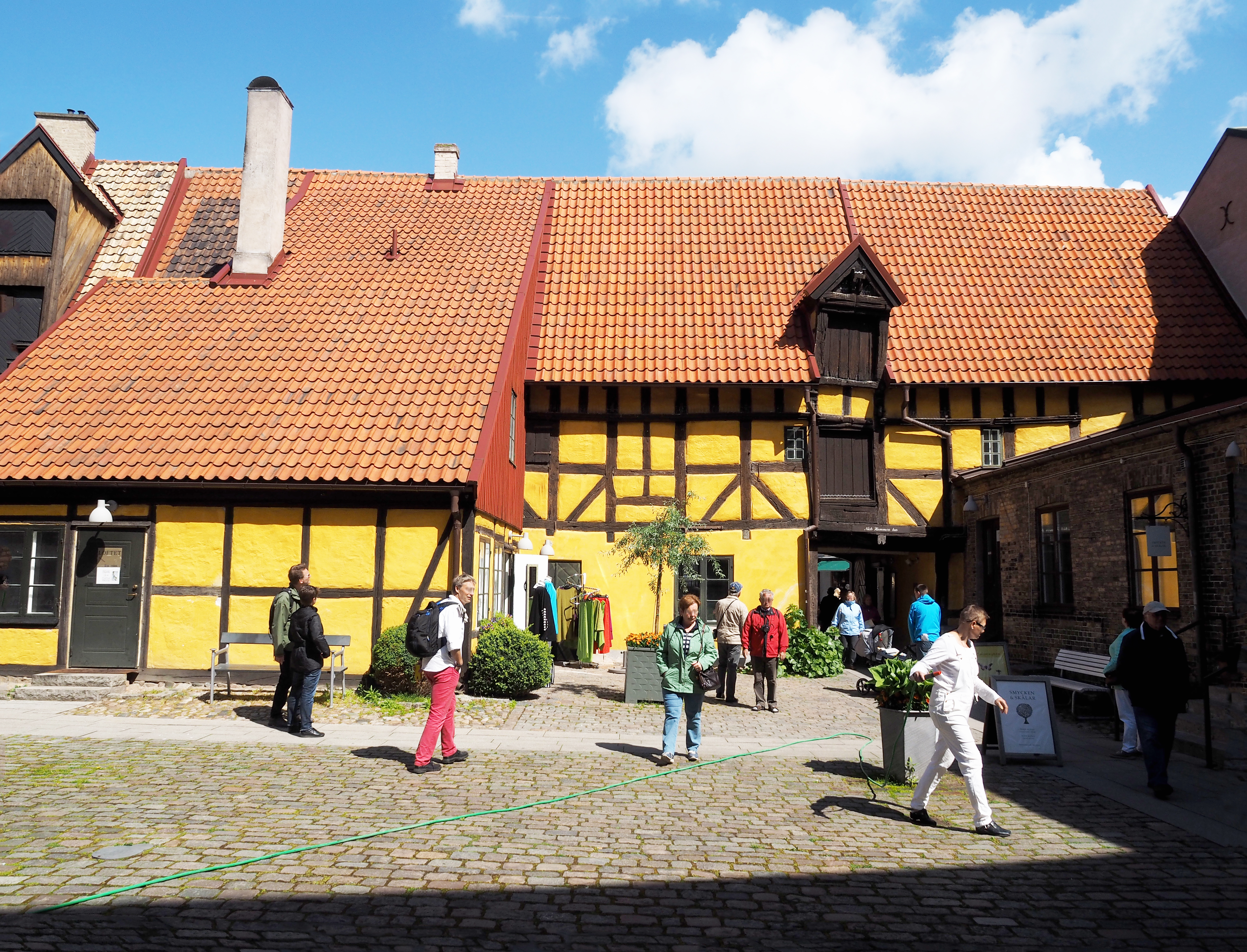 Lilla torg (Kleiner Markt) Malmö, Schweden